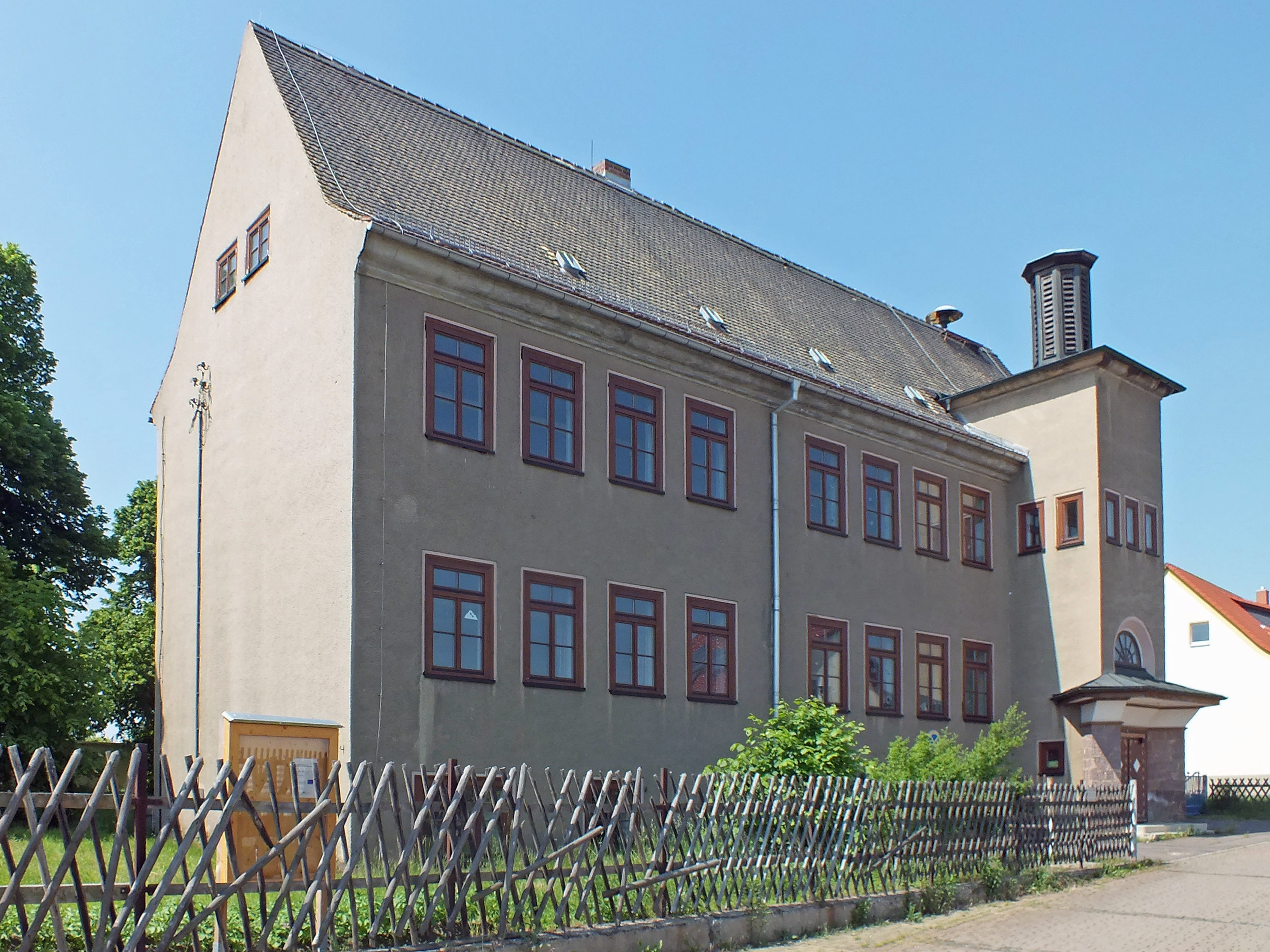 Das ehemalige Schulhaus von 1926 in Wyhra, Architekt Curt Schiemichen